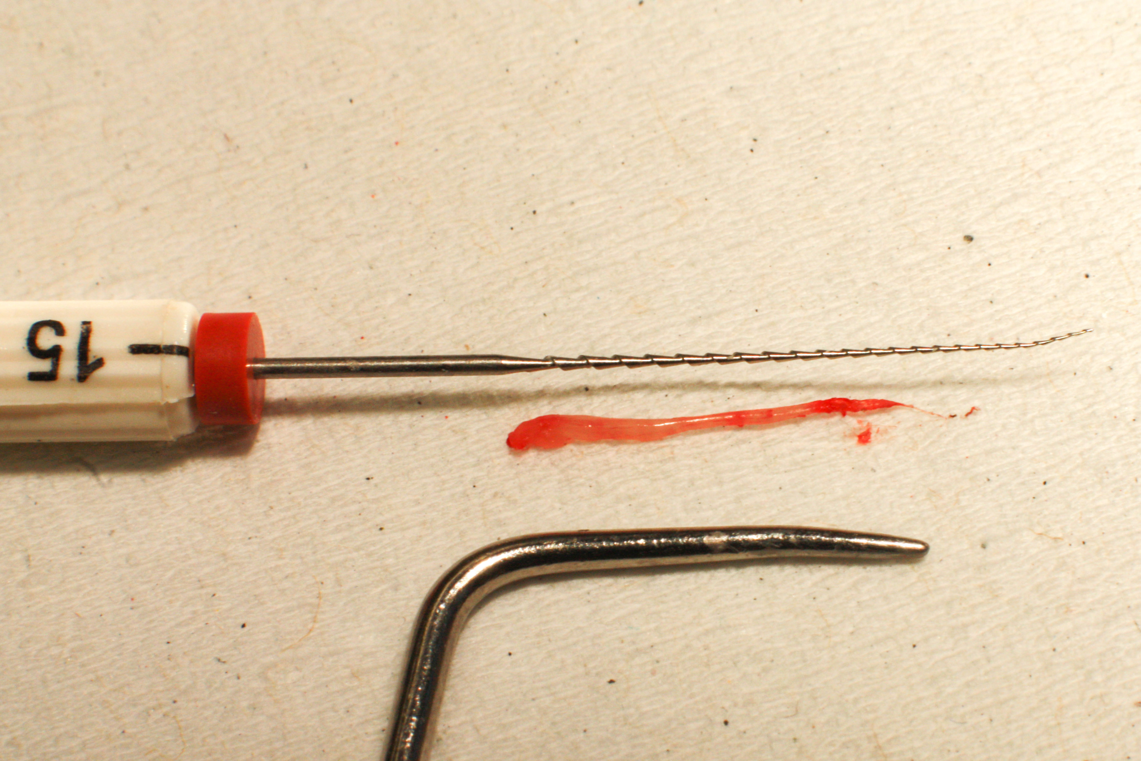 Dental traumas; Frontzahntrauma; Alter: 16 Jahre; Zahn 11; Faustschlag, Kronenfraktur mit Pulpaeröffnung, Wurzelbehandlung; Kunststoffaufbau ohne Wurzelstift extierpierte vitale Pulpa; Zahnmark 11